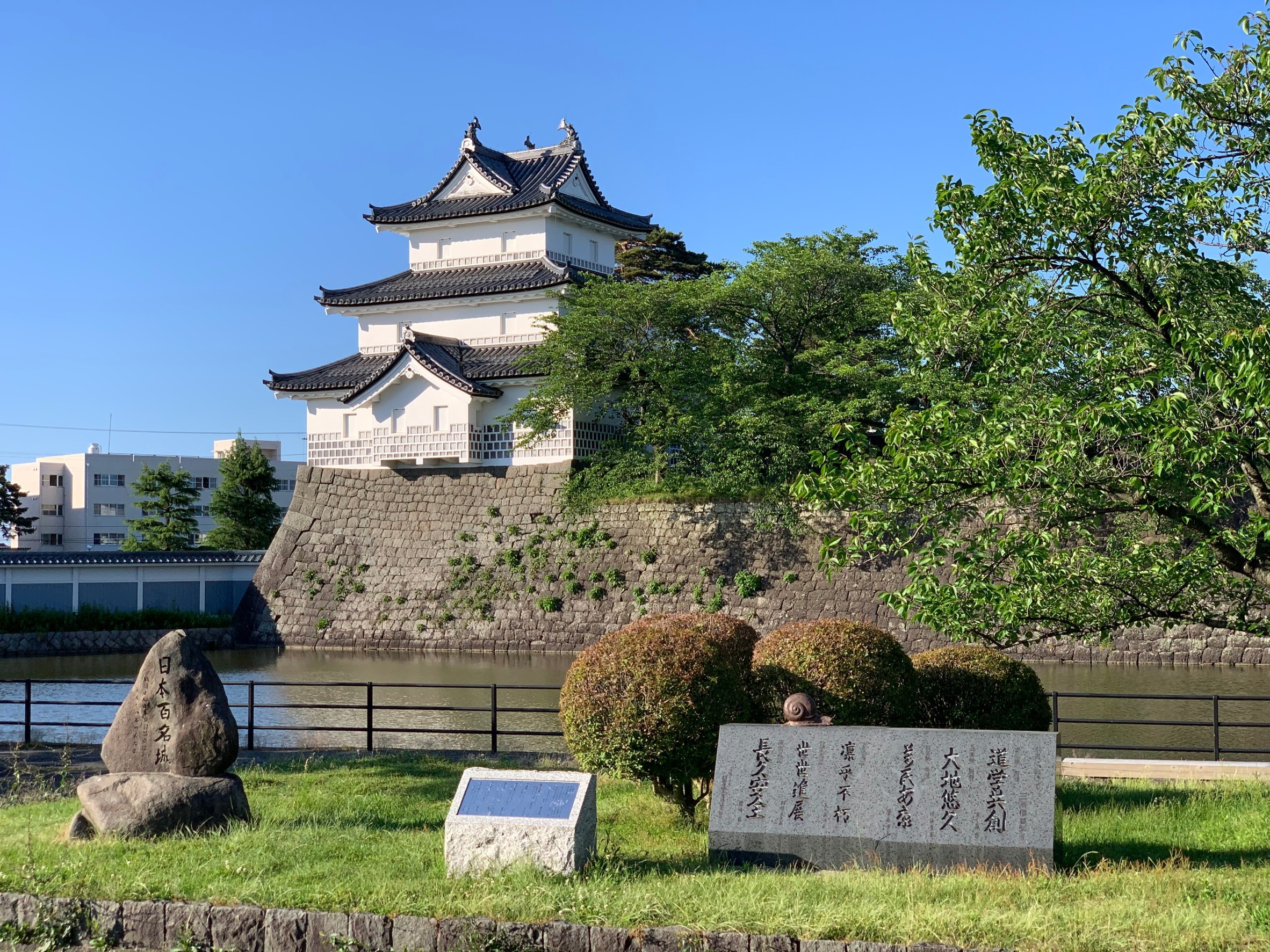 新発田城の復元三階櫓（2020年5月）